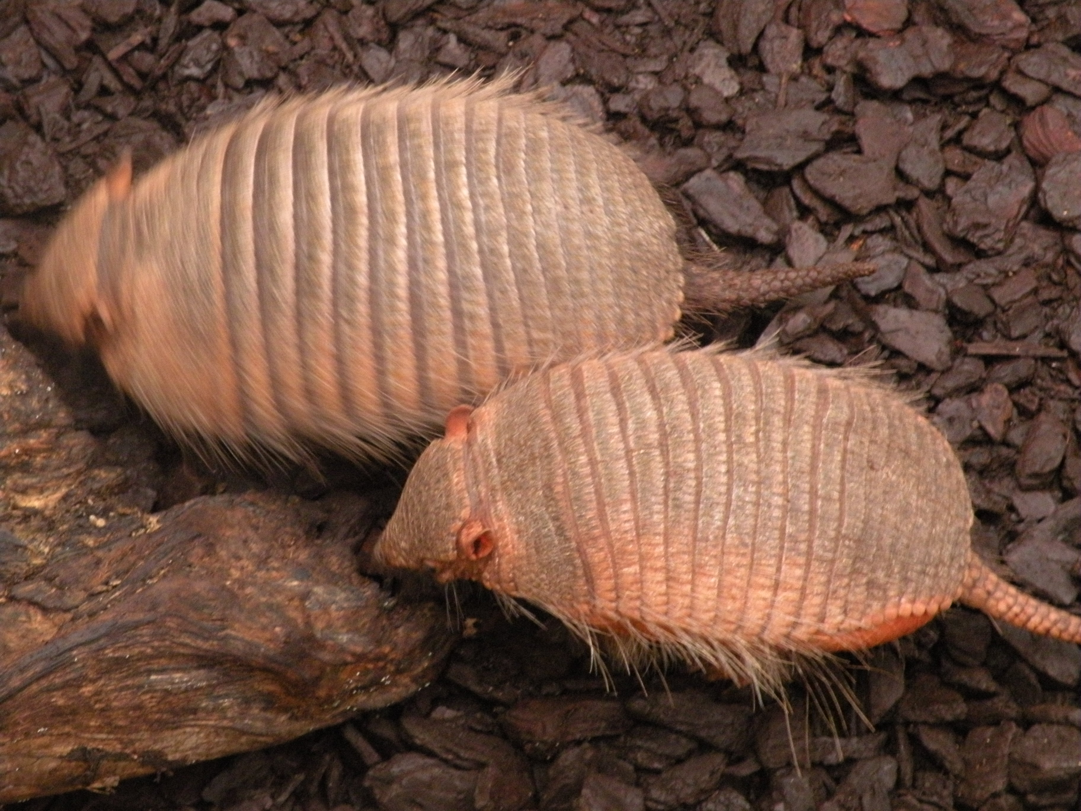 tatou velu